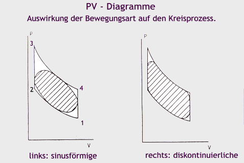 Skizze Totraum